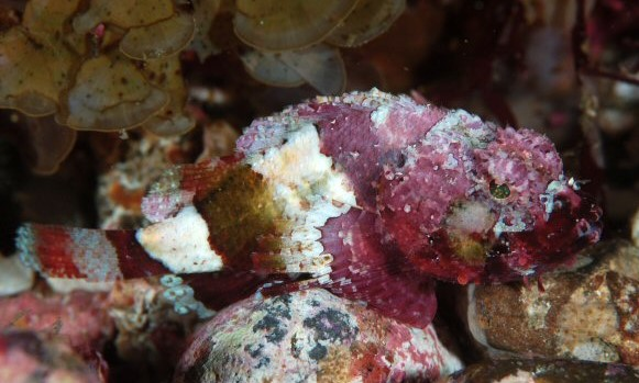 ヒメサツマカサゴ Scorpaenopsis cotticeps